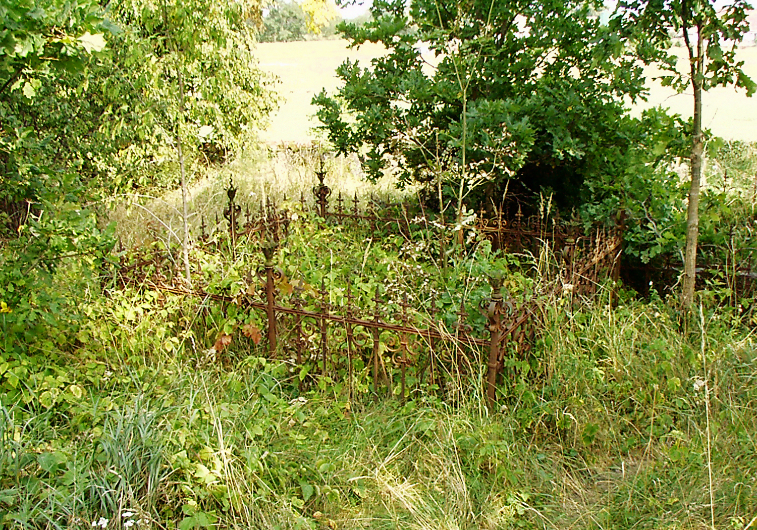 Nowe Dwory; cmentarz ewangelicki